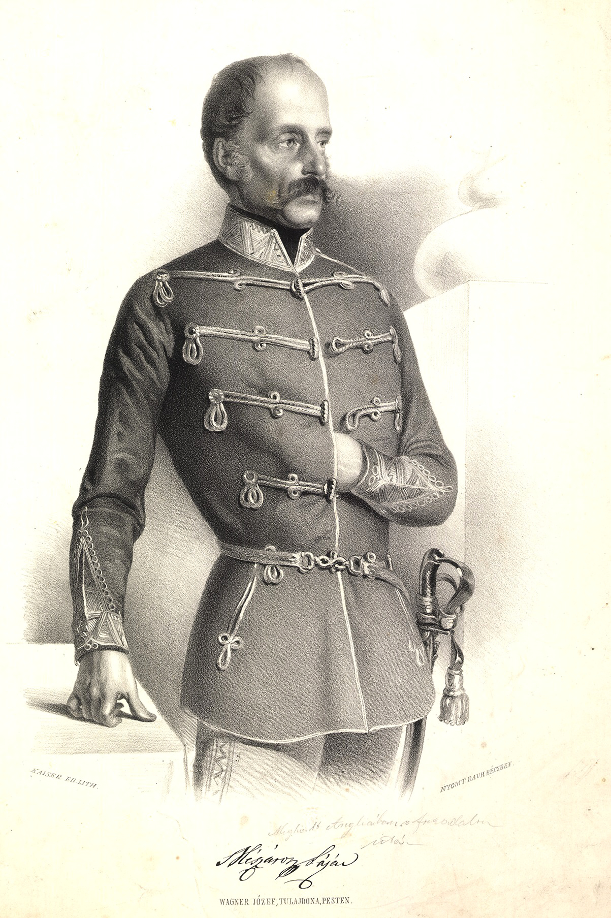 Mészáros Lázár honvéd altábornagy, az első felelős magyar kormány hadügyminisztere